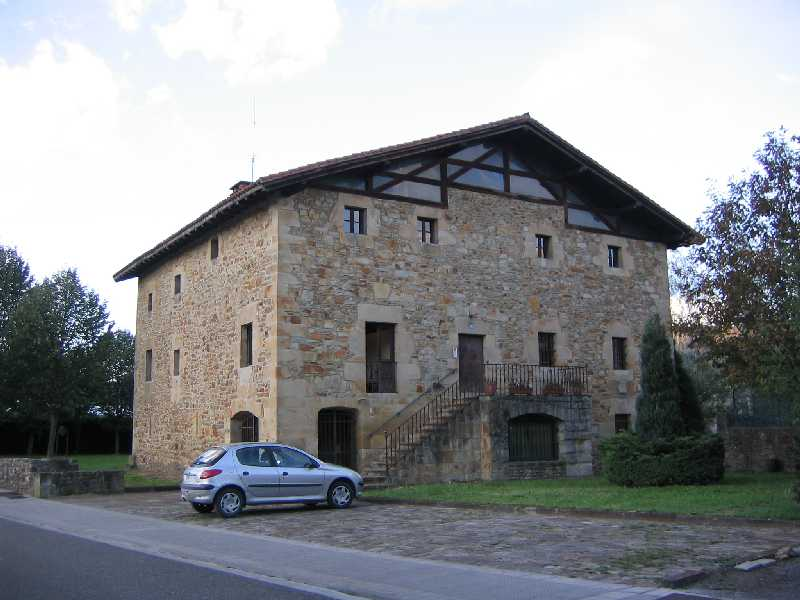 Casa de Juntas de Astola. Fotografía propia --txo 22:45 21 oct, 2005 (CEST)